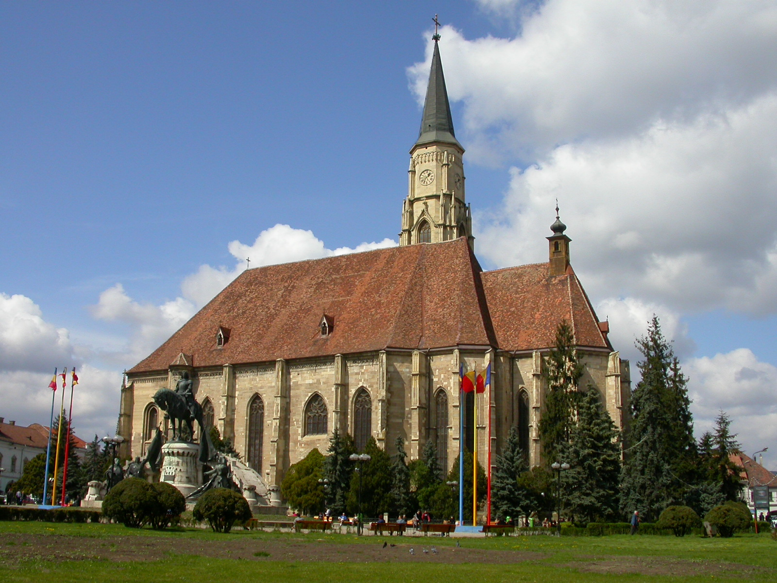 Biserica romano-catolică "Sf. Mihail" 1349-1480